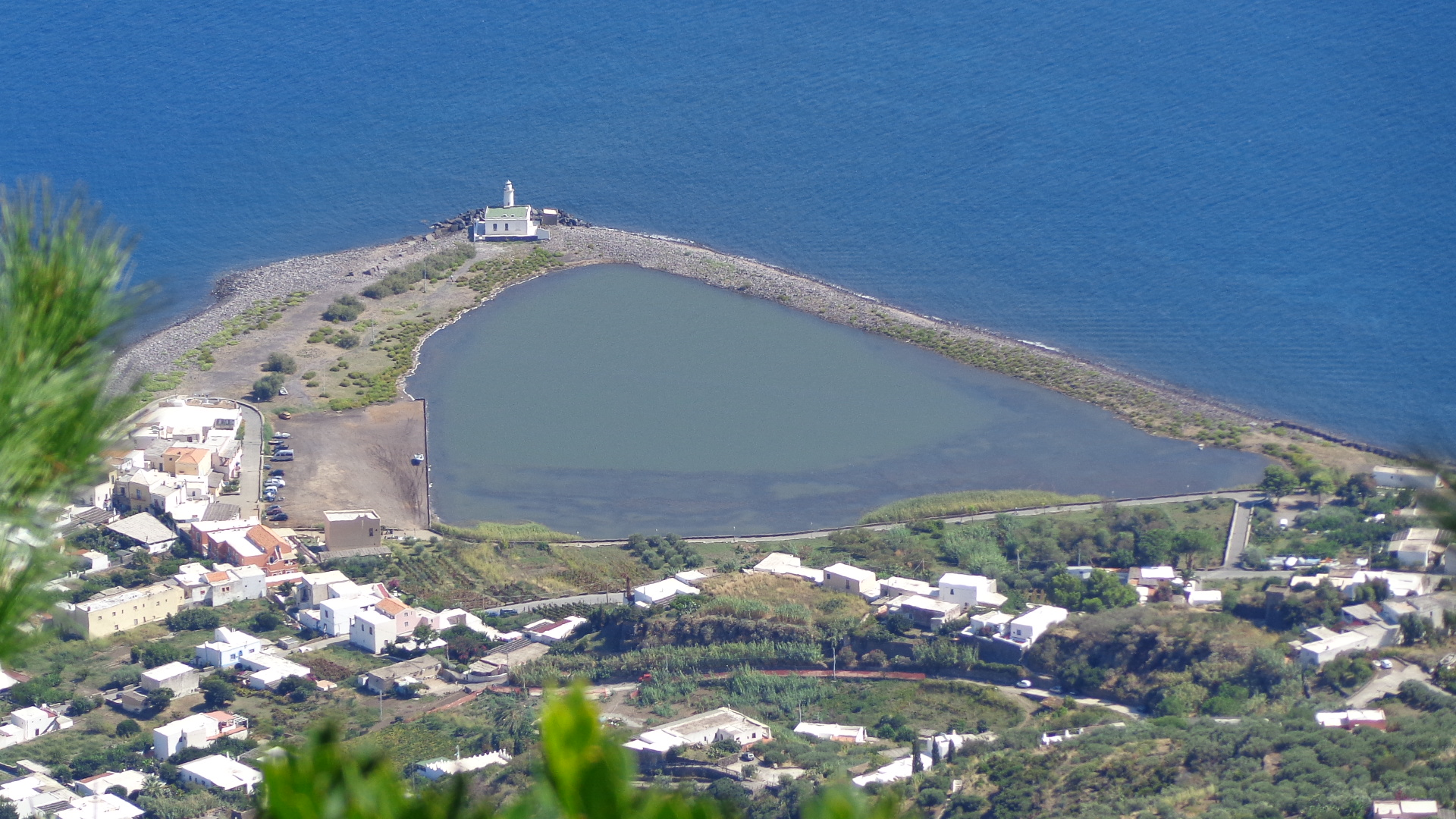 Laghetto di Lingua visto dalla Fossa delle Felci